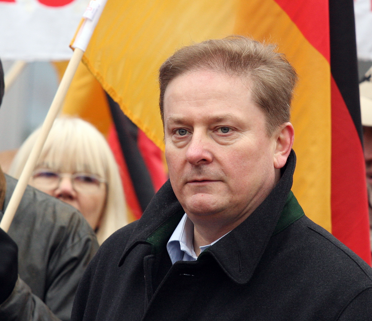 Henry Nitzsche, parteiloser Bundestagsabgeordneter